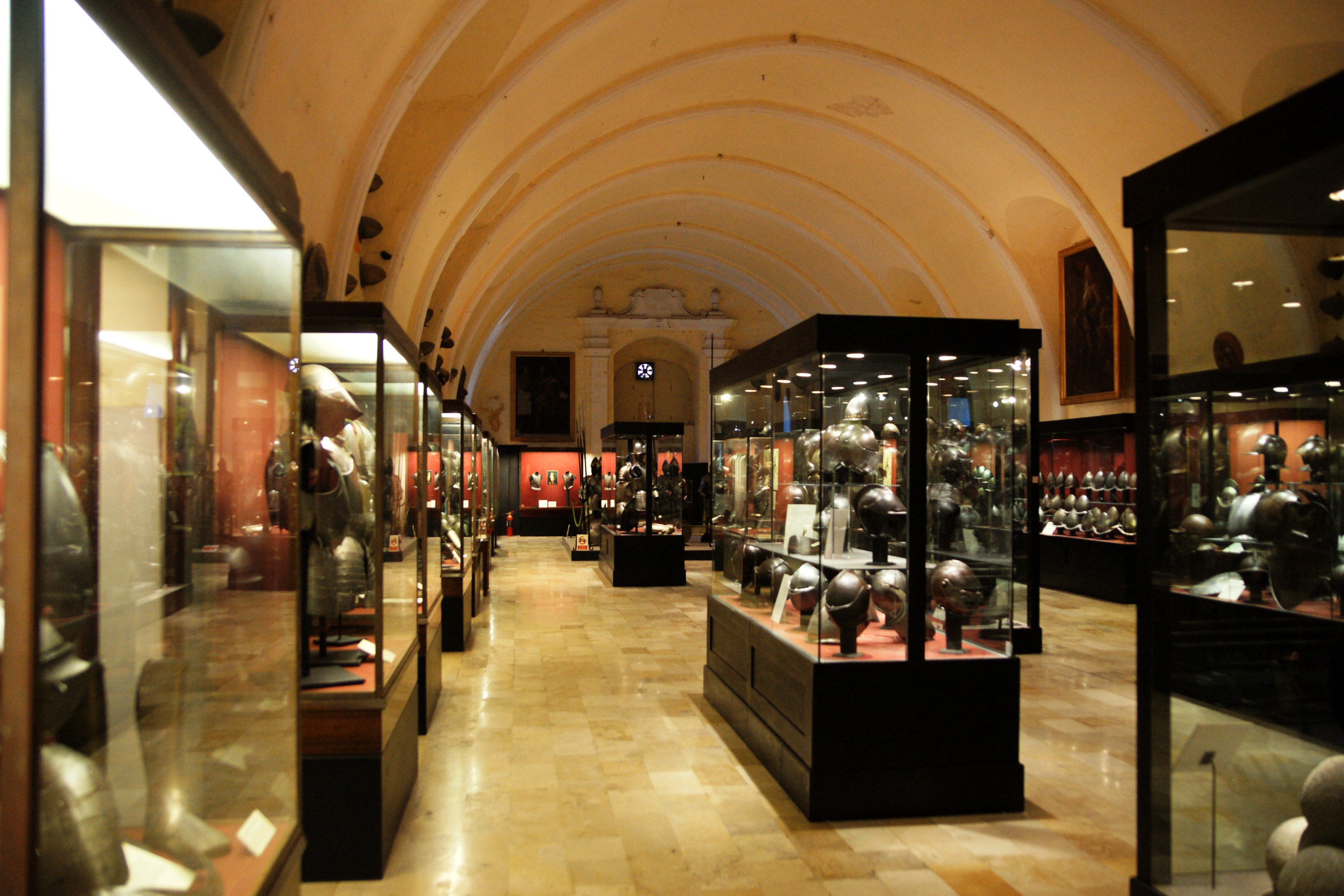 Valletta: Palace Armoury